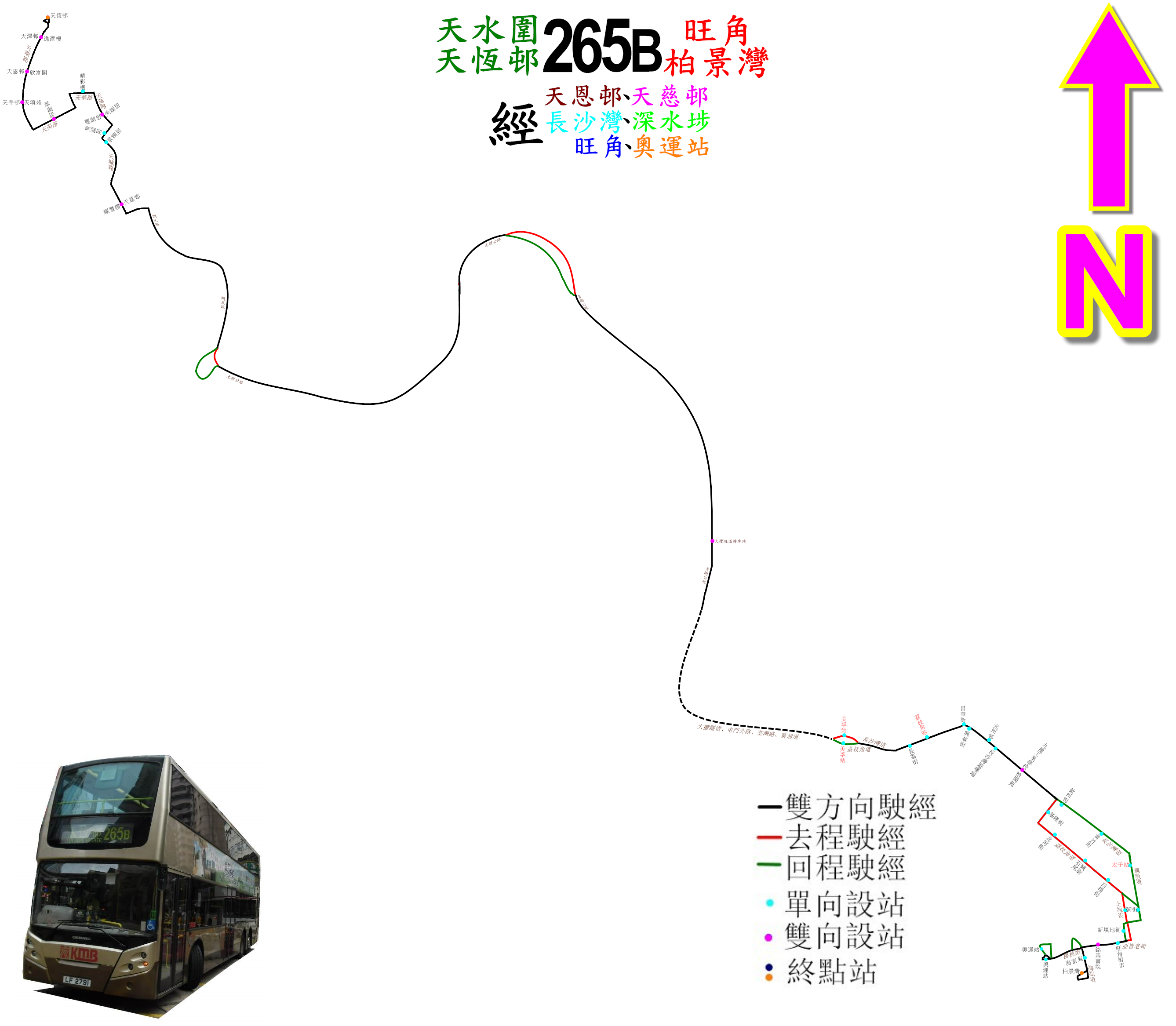 中文（香港）: 九巴265B線的走線圖